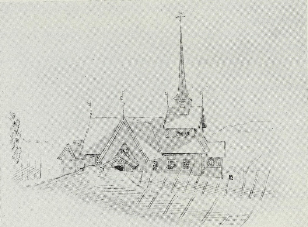 Tegning av Grinaker stavkirke datert 9. juli 1846, hentet fra «Hadeland – bygdenes historie, bind 1» (utgitt 1932), s. 256.